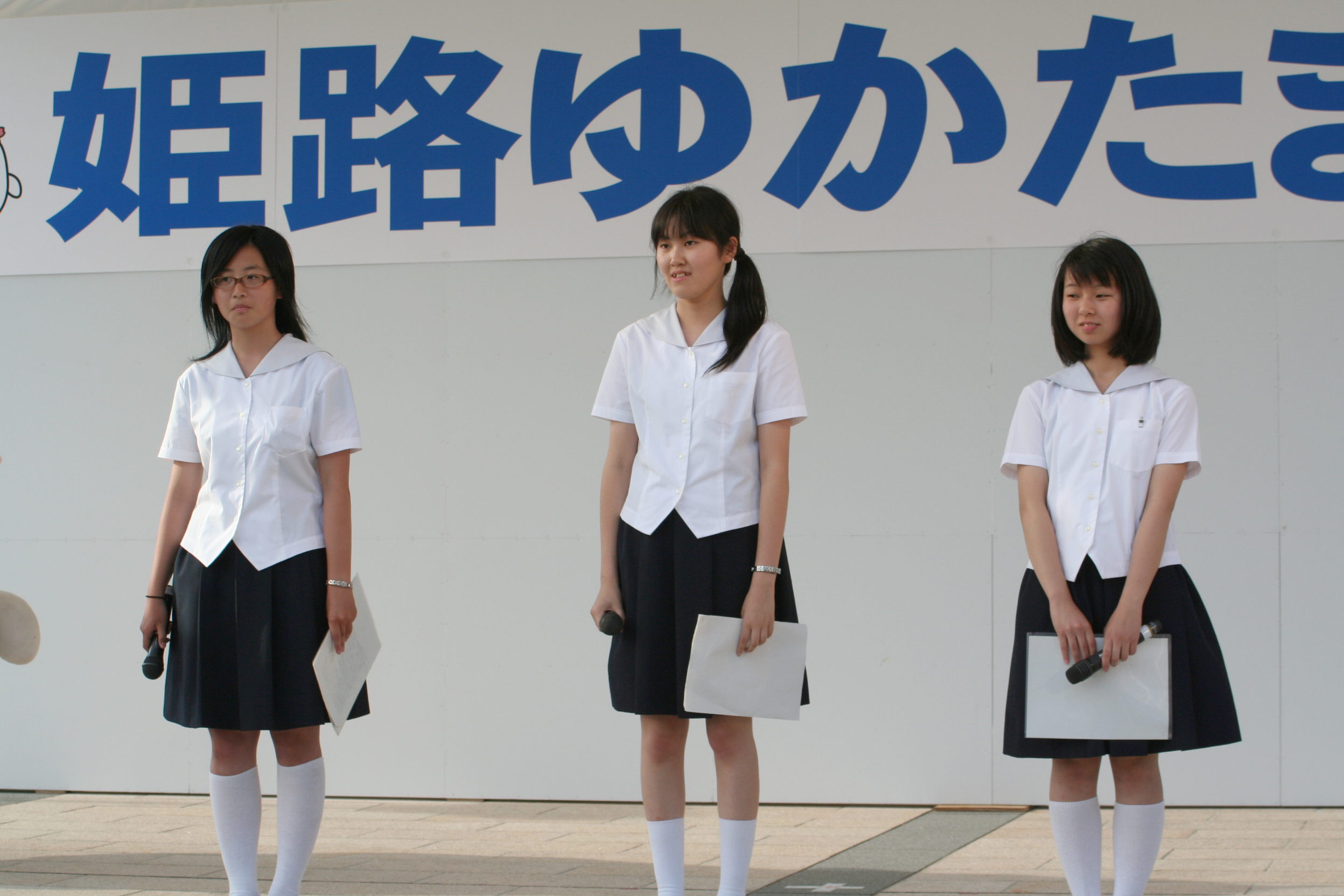 2010年6月22日から23日に、兵庫県姫路市姫路城南の大手前公園にて開催された姫路浴衣祭の催しの様子など。祭り初日を撮影。 ステージに立つ兵庫県立姫路飾西高等学校の女生徒。